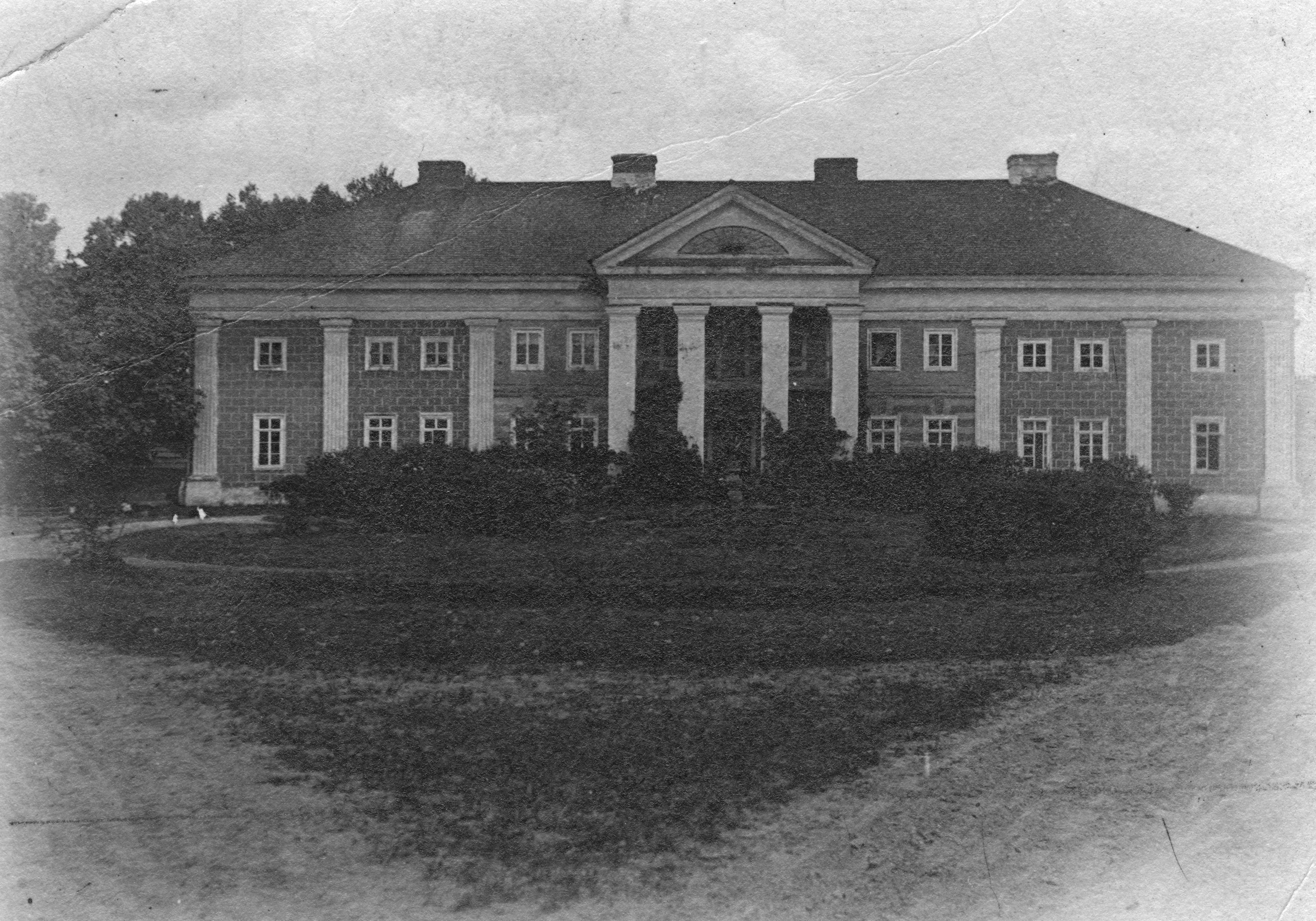 Беларуская (тарашкевіца): Мосар (Mosar), сядзіба Бжастоўскіх (Bžastoŭski)